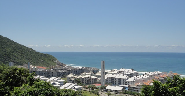 Mirante